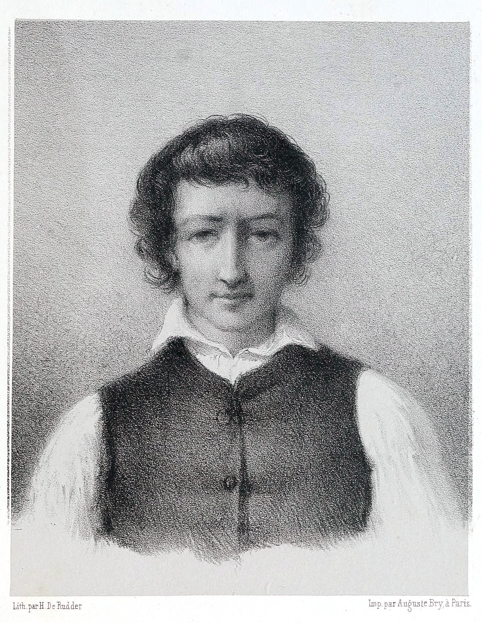 Raffet, autoportrait de 1823 lithographié par L.H. de Rudder